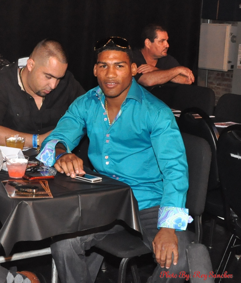 Yuriorkis Gamboa en el evento Boxistico del Miami Dade Auditorium del 24 de junio del 2011